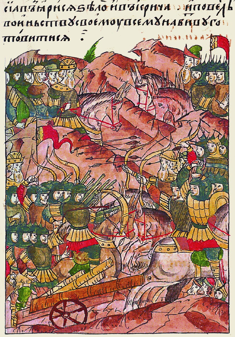 Битва на Ворскле. Миниатюра XVI в. из Лицевого летописного свода. "и удал, рассуди, если я старше тебя, а ты моложе меня, то подобает мне быть твоим отцом, а тебе стать моим сыном, отдавать мне каж- дый год дань и об- роки со всего твоего княжения, а во всем твоем княжении на деньгах отчеканить мой ордынский знак». Витовт Кейстутович, услышав такие слова, разъярился, закричал и повелел своему войску готовиться к битве."